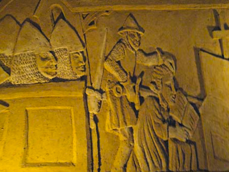 relief van moord op Karel de Goede